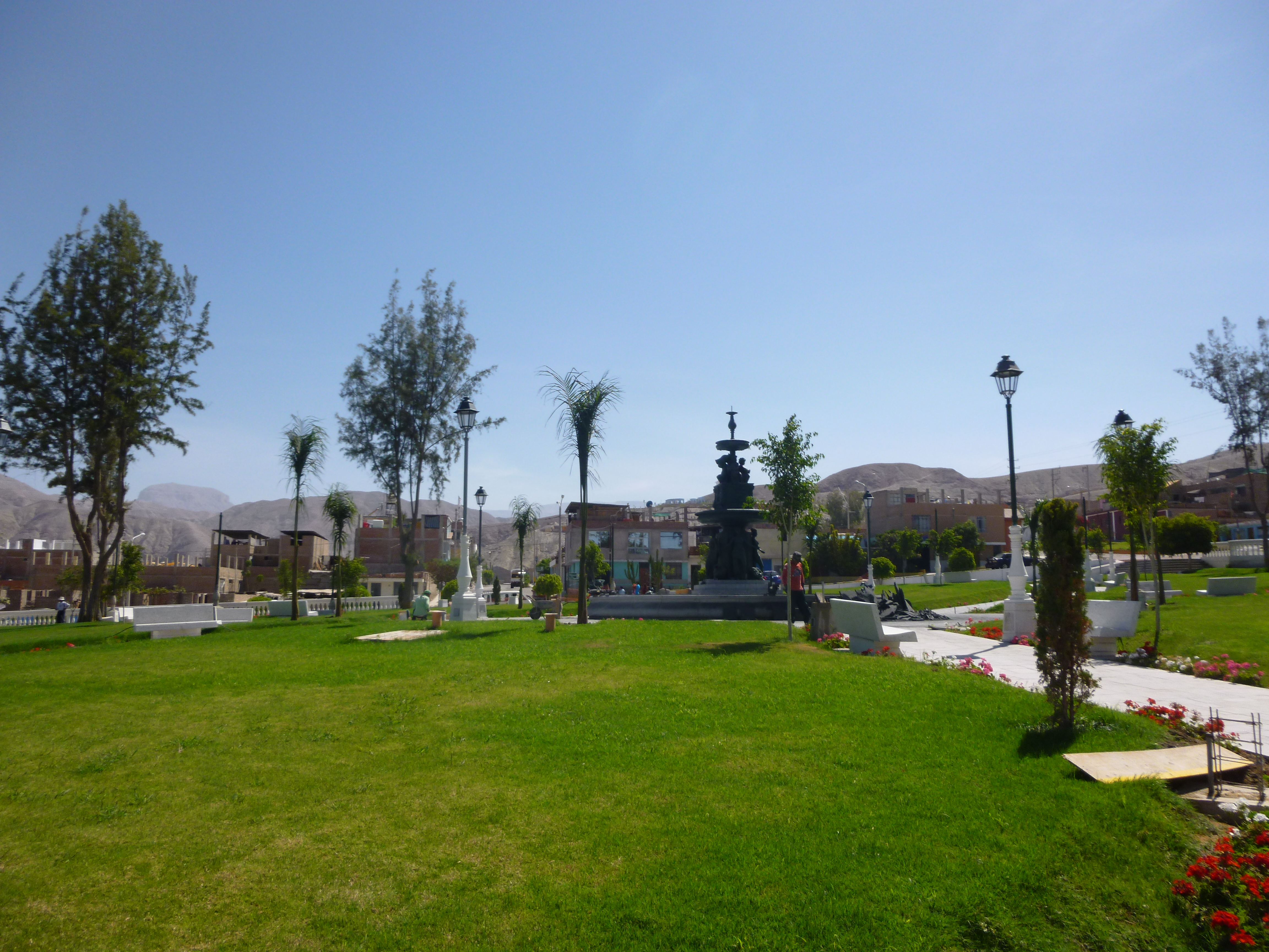 Plaza de Armas del Distrito de Samegua, Provincia de Mariscal Nieto, Departamento de Moquegua